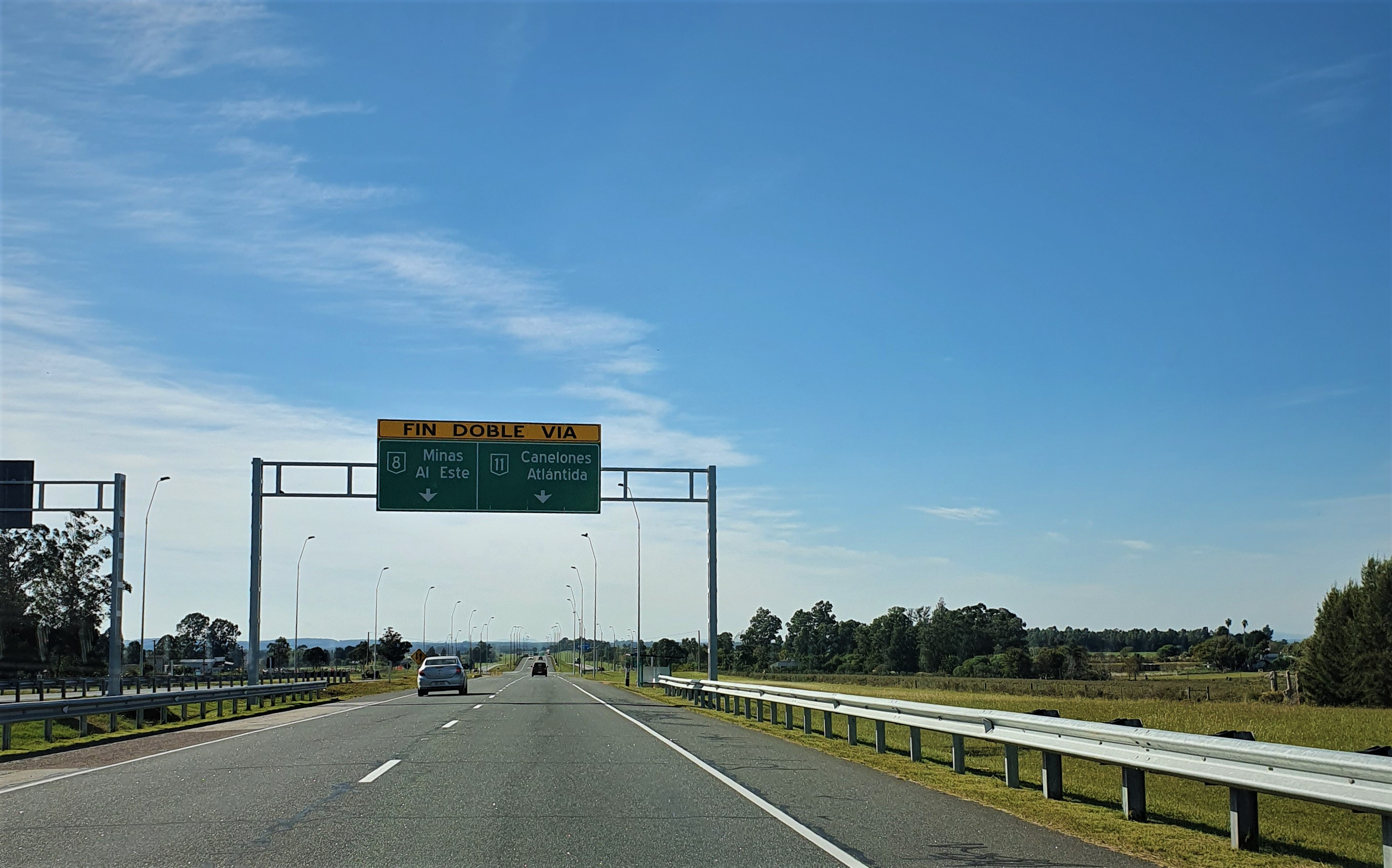 Ruta 8 km 46 sentido este, Canelones, Uruguay